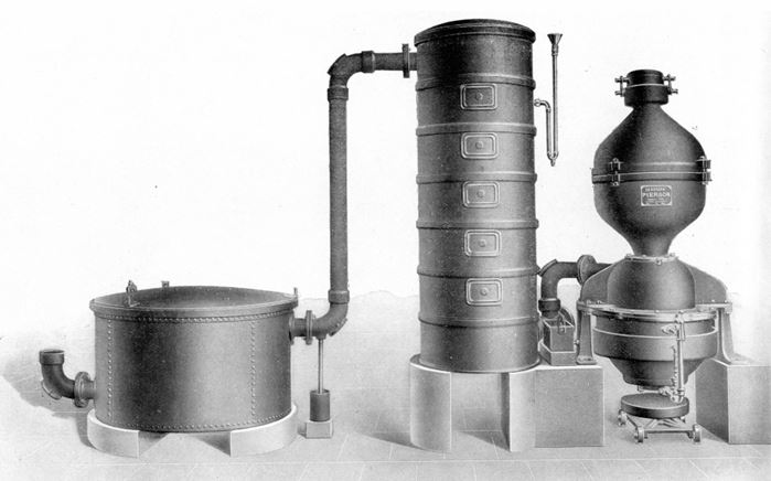 Afbeelding van een Pierson gasgeneraror